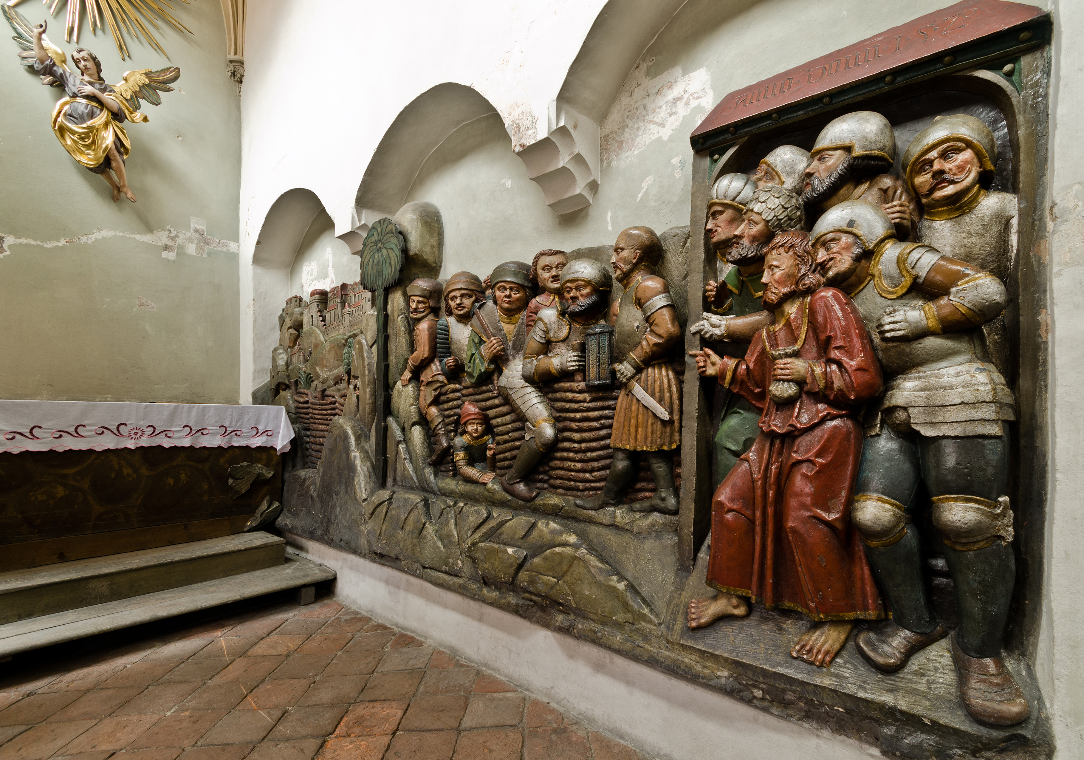 Kłodzko, kościół Joannitów, nast. Jezuitów, ob. parafialny p.w. Wniebowzięcia NMP, poł.XIV, XVI, 2 poł. XVII, XIX